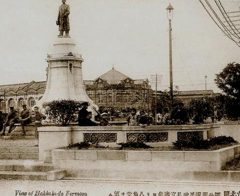 中文（台灣）: 立於臺北府城西門故址的祝辰巳銅像，後方是西門紅樓。